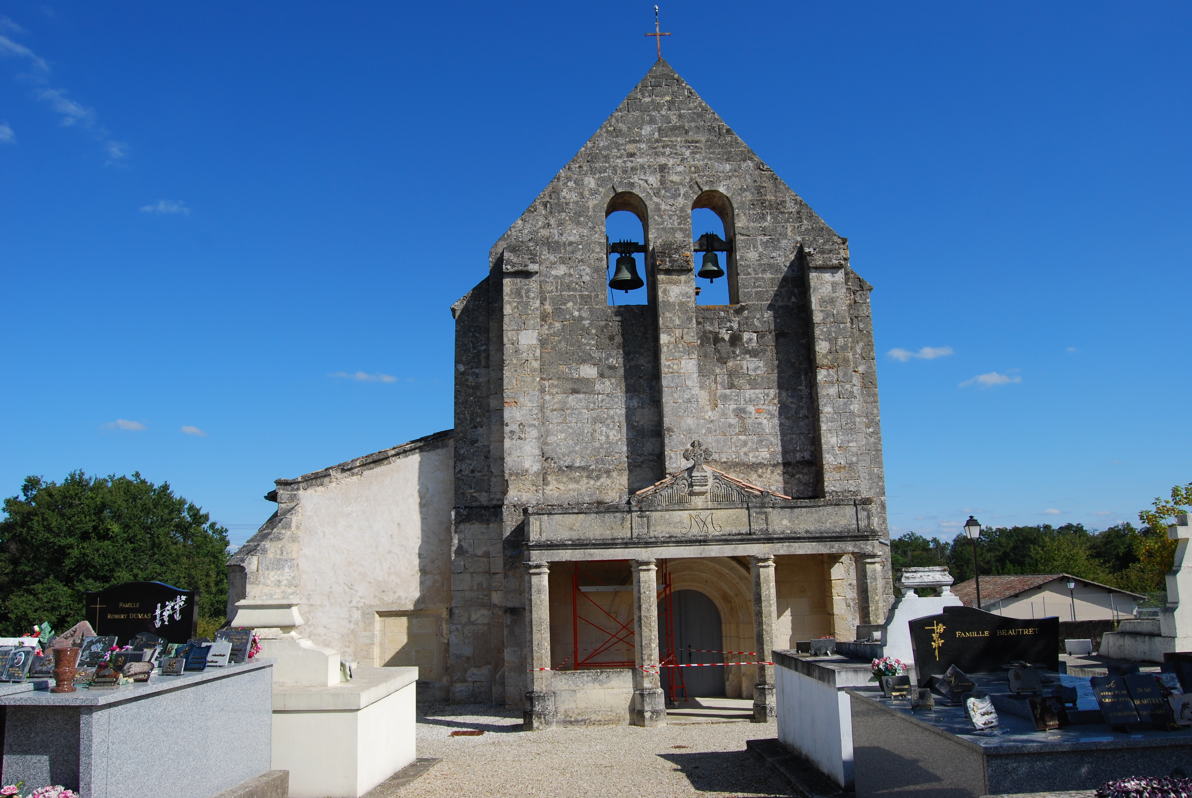 Église Saint-Martin du Pout, (Inscrit, 1987) .